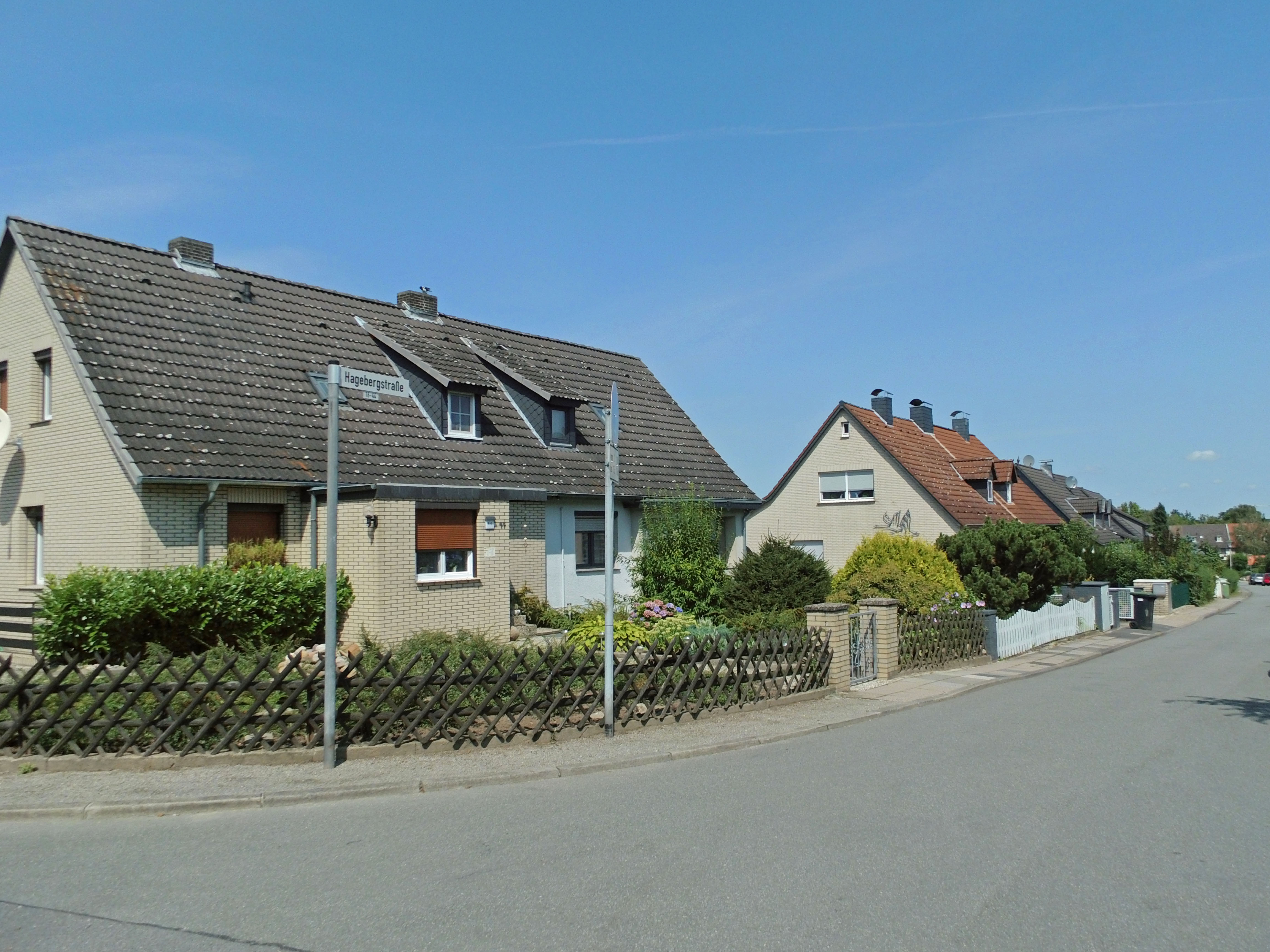 Wohnhäuser aus den 1950er Jahren an der Hagebergstraße im Wolfsburger Stadtteil Hageberg